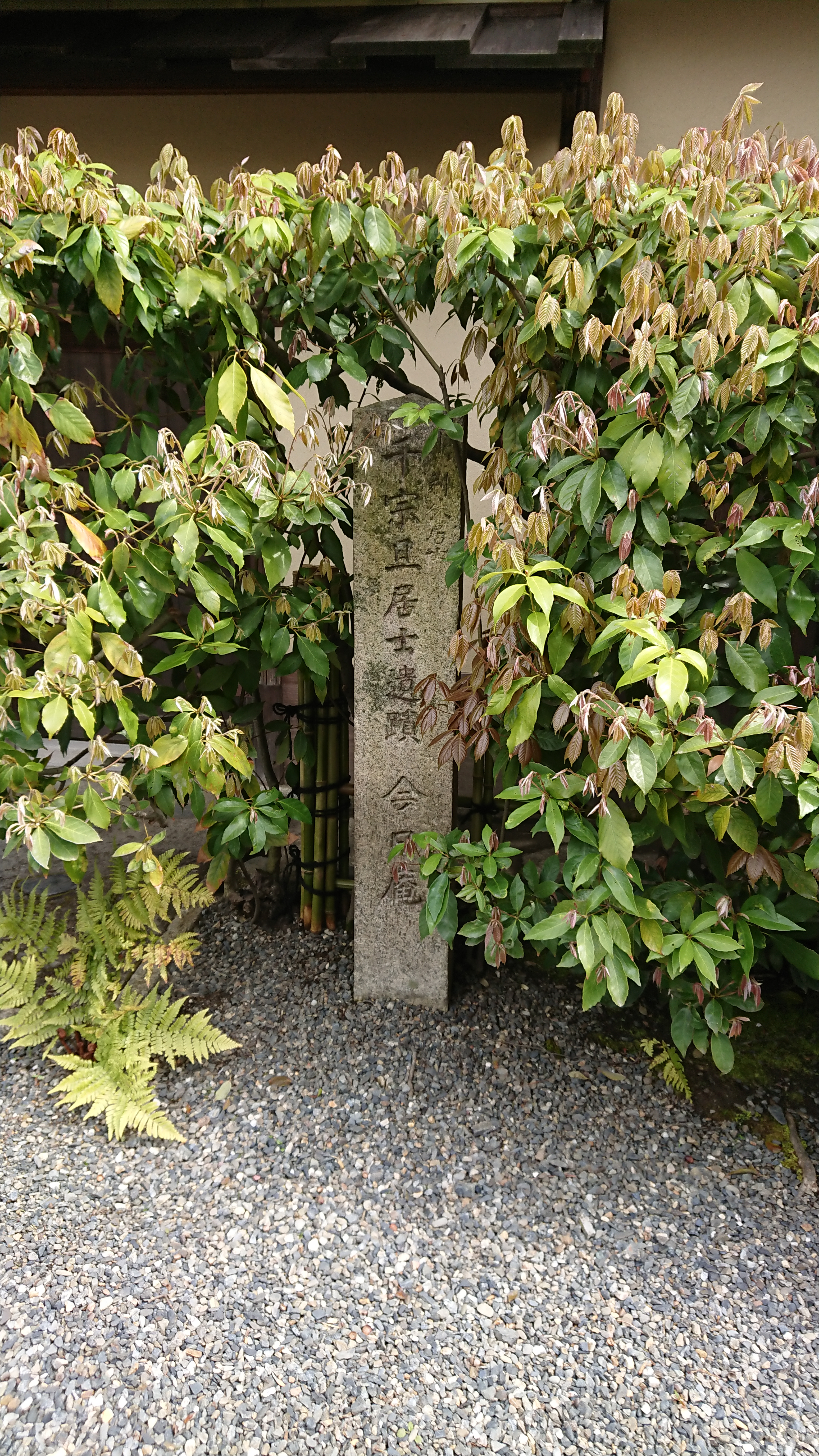 千宗旦遺跡裏千家今日庵石碑